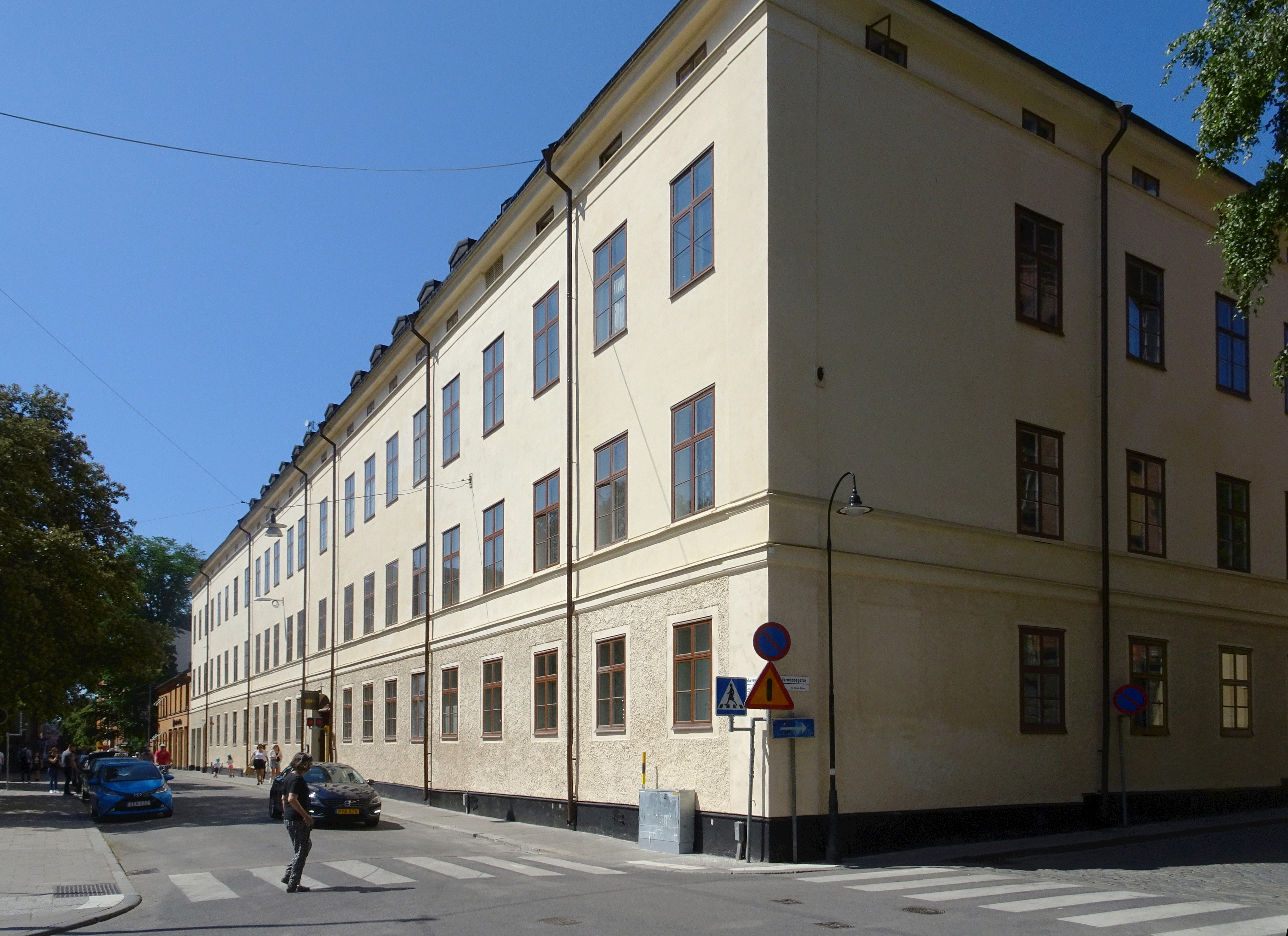 Sifwertska kasernen sedd från Tjärhovsgatan